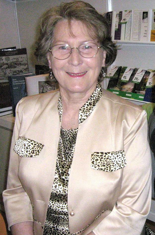 Irena Santor (ur. 9 grudnia 1934 w Papowie Biskupim) – polska piosenkarka śpiewająca mezzosopranem.